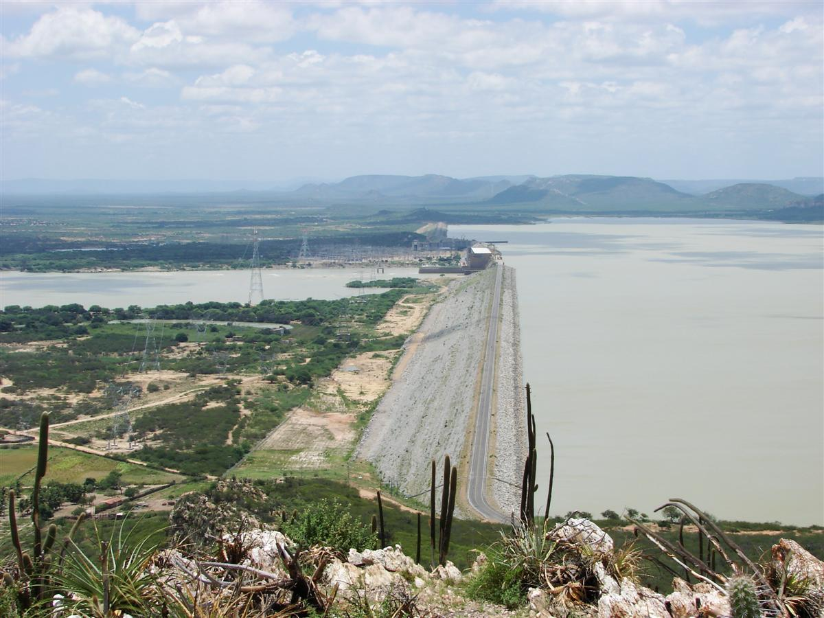 A barragem de Sobradinho, Bahia, Brasil.